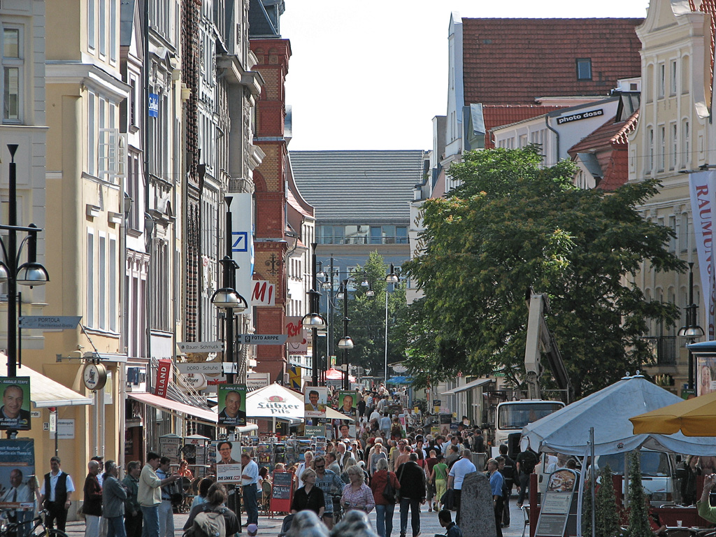 Beschreibung: Kröpeliner Straße / Haupteinkaufsstraße in Rostock / Germany Fotograf: Darkone, 17. August 2005